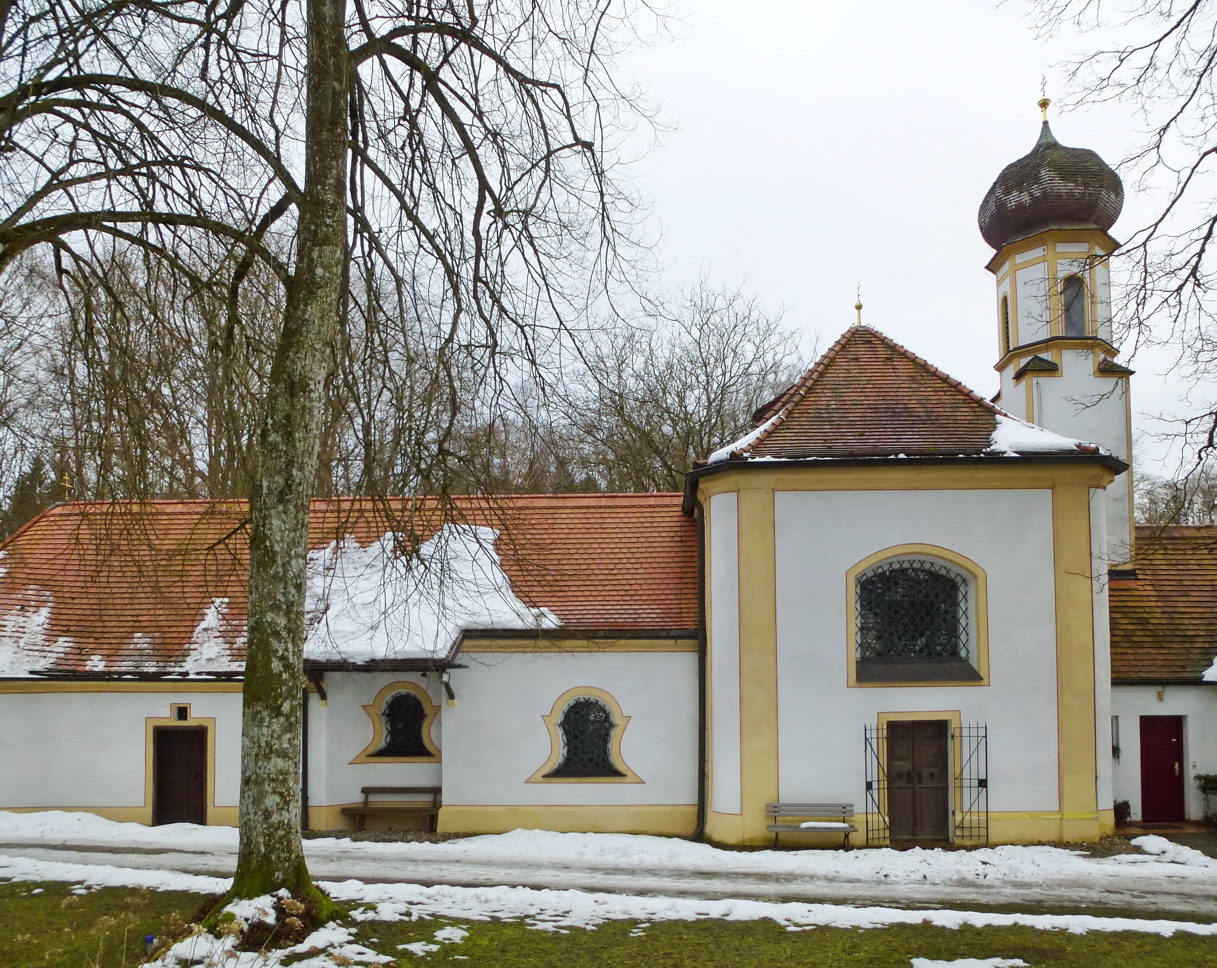 Weßling_Grünsink 2: Katholische Wallfahrtskapelle Maria Hilf, Ansicht von NO mit dem Haupteingang